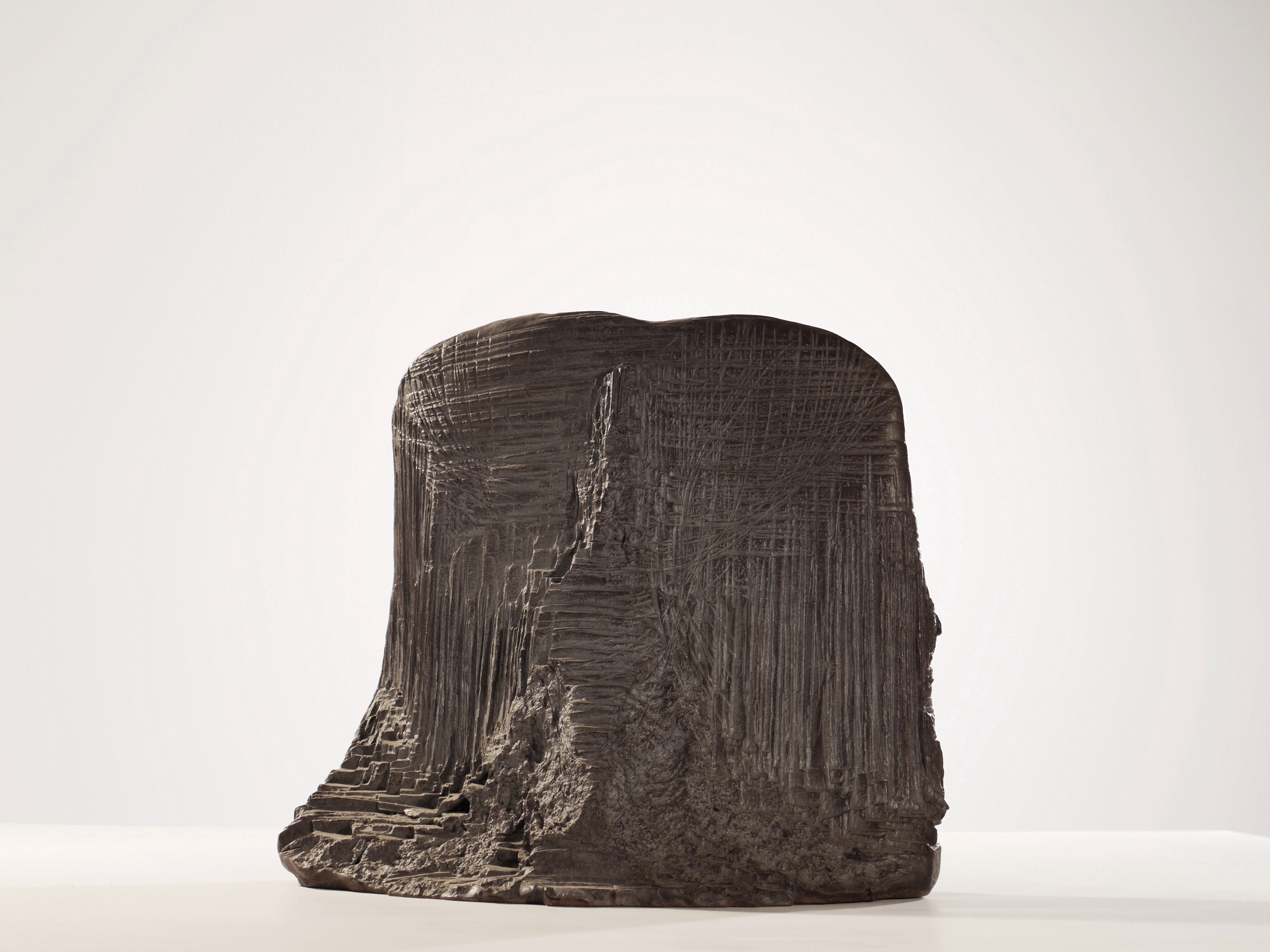 Le chemin à partir de l’homme qui marche, version 4, 2000, polyester, 39 x 44 x 23 cm